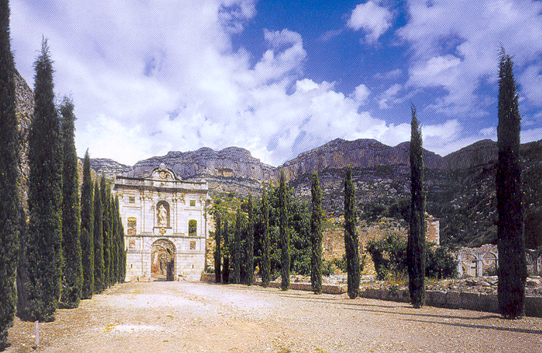 Vista de la Cartuja de Escaladei (Priorato - Cataluña)